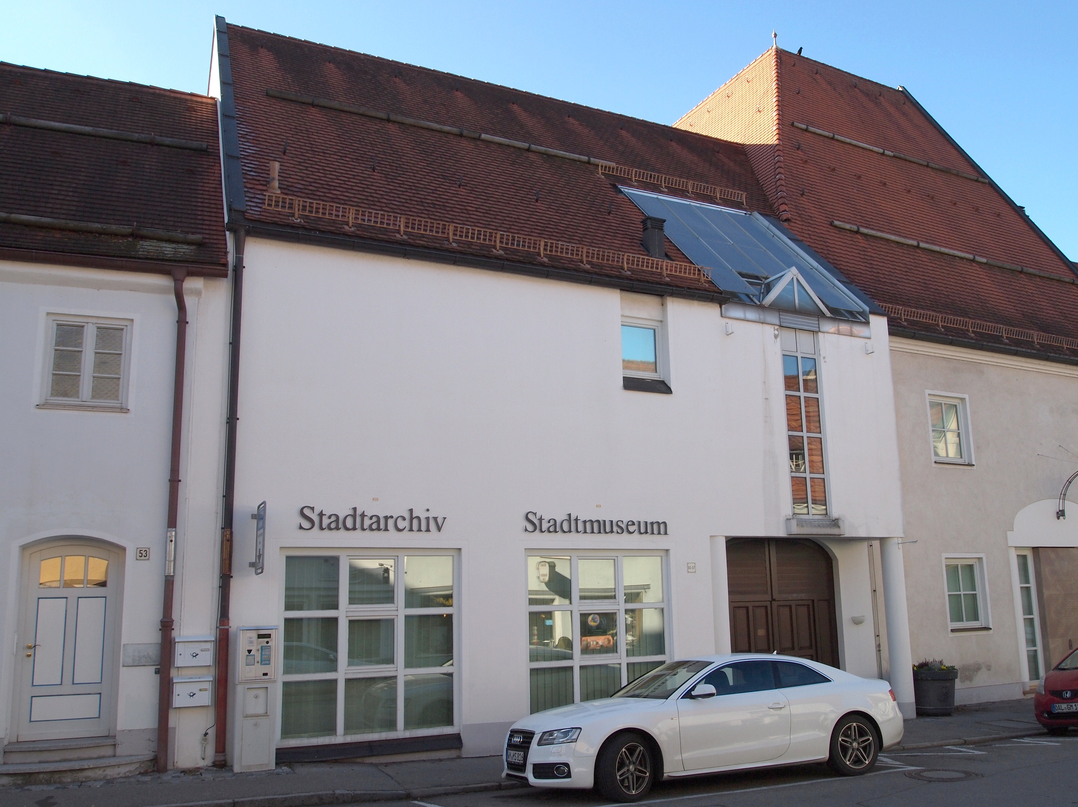 Schongau, Christophstraße 16, Ehem. Spitalkirche St. Erasmus, heute Stadtmuseum Schongau